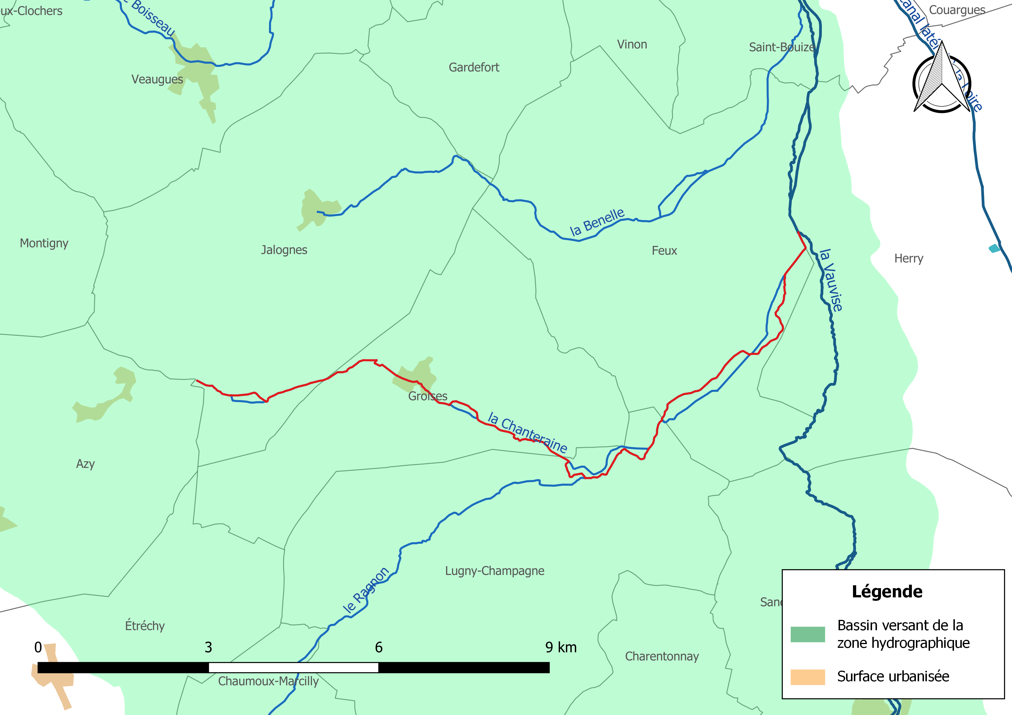 Carte du cours d'eau « la Chanteraine » (France) et de la zone hydrographique dans laquelle il s'insère.